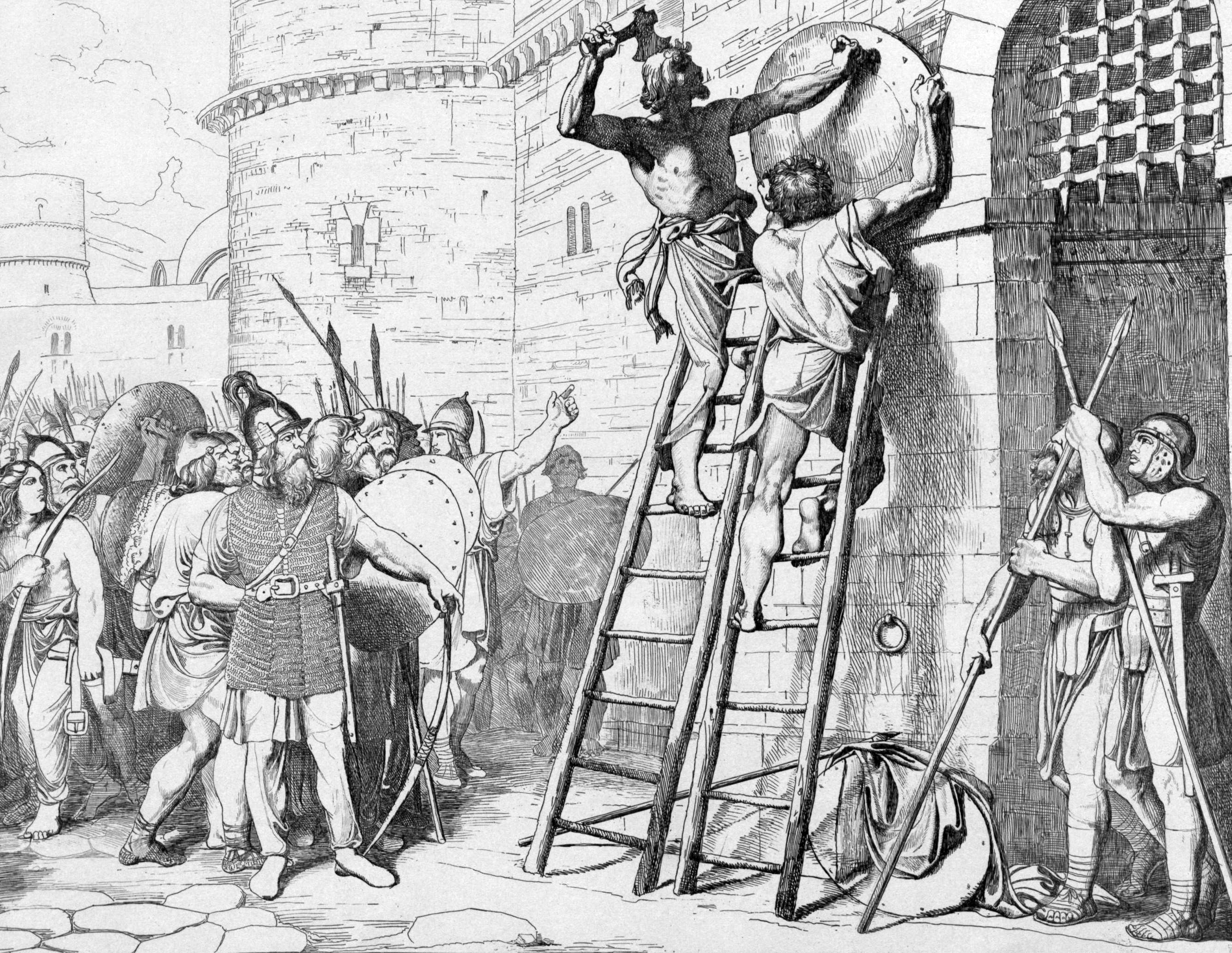 Oleg having his shield nailed to the gates of Tzargrad (Constantinople). Олег прибивает щит свой к вратам Царьграда. Государственный Русский музей, Санкт-Петербург